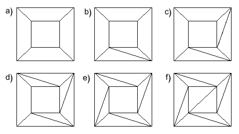 חלוקת קוביה